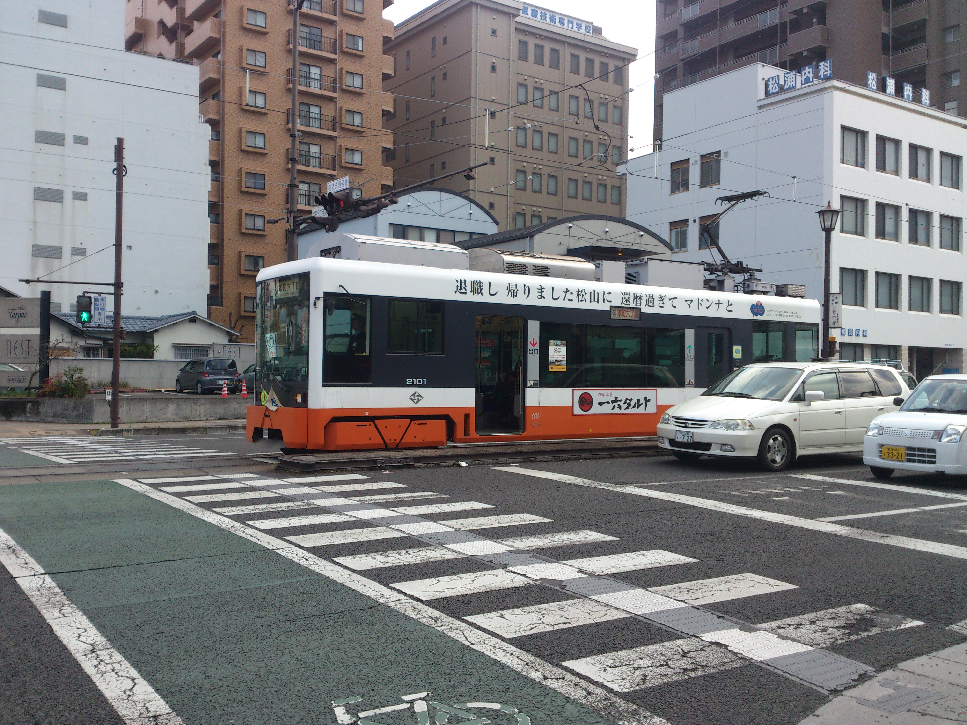 本町四丁目電停